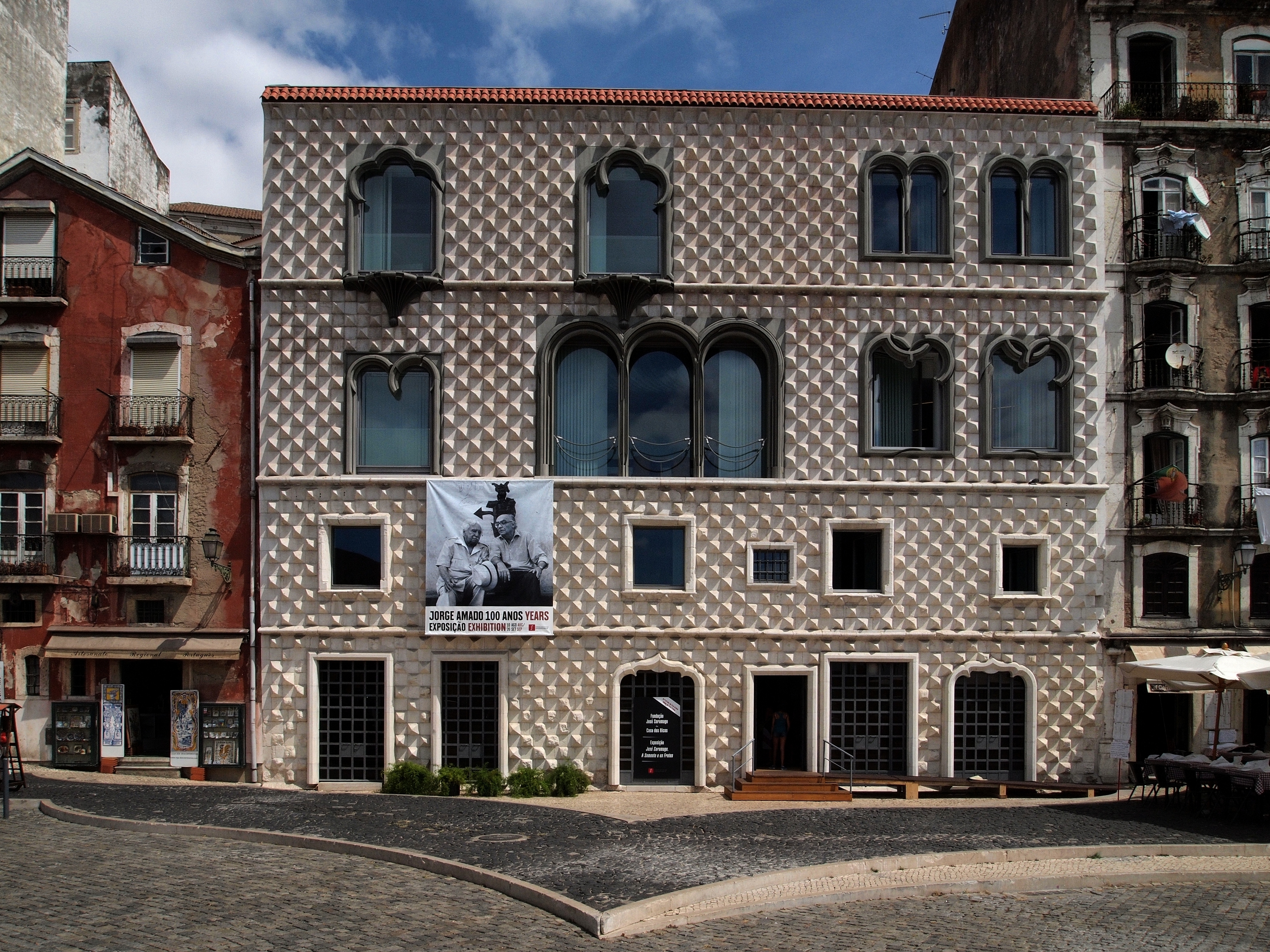 Lisbon